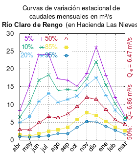 Curva de Variación Estacional Claro de Rengo en Hacienda Las Nieves. # Dirección General de Aguas # Diagnóstico y clasificación de los cursos y cuerpos de agua según objetivos de calidad. Cuenca del río Rapel. # Santiago de Chile # Ministerio de Obras Públicas (Chile) # 2004 # url: # urlarchivo: # Tabla 4.4: Claro de Rengo en Hacienda Las Nieves pág.58 mes 5% 10% 20% 50% 85% 95% abr 8.258 6.563 4.969 2.919 1.516 1.032 may 15.461 10.525 6.654 2.878 1.174 0.780 jun 24.088 16.889 10.986 4.830 1.755 0.968 jul 24.057 18.334 13.102 6.664 2.538 1.199 ago 17.269 13.945 10.698 6.273 2.968 1.731 sep 16.935 14.265 11.480 7.275 3.539 1.844 oct 15.232 13.949 12.394 9.424 5.766 3.617 nov 18.758 17.267 15.463 12.013 7.764 5.268 dic 26.293 21.914 17.575 11.528 6.857 5.054 ene 18.203 15.450 12.644 8.557 5.185 3.802 feb 12.092 10.248 8.388 5.719 3.569 2.705 mar 6.818 6.246 5.554 4.231 2.602 1.645